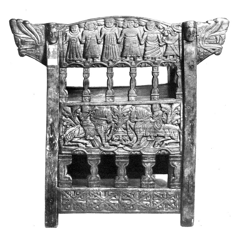 Gårastolens bakside